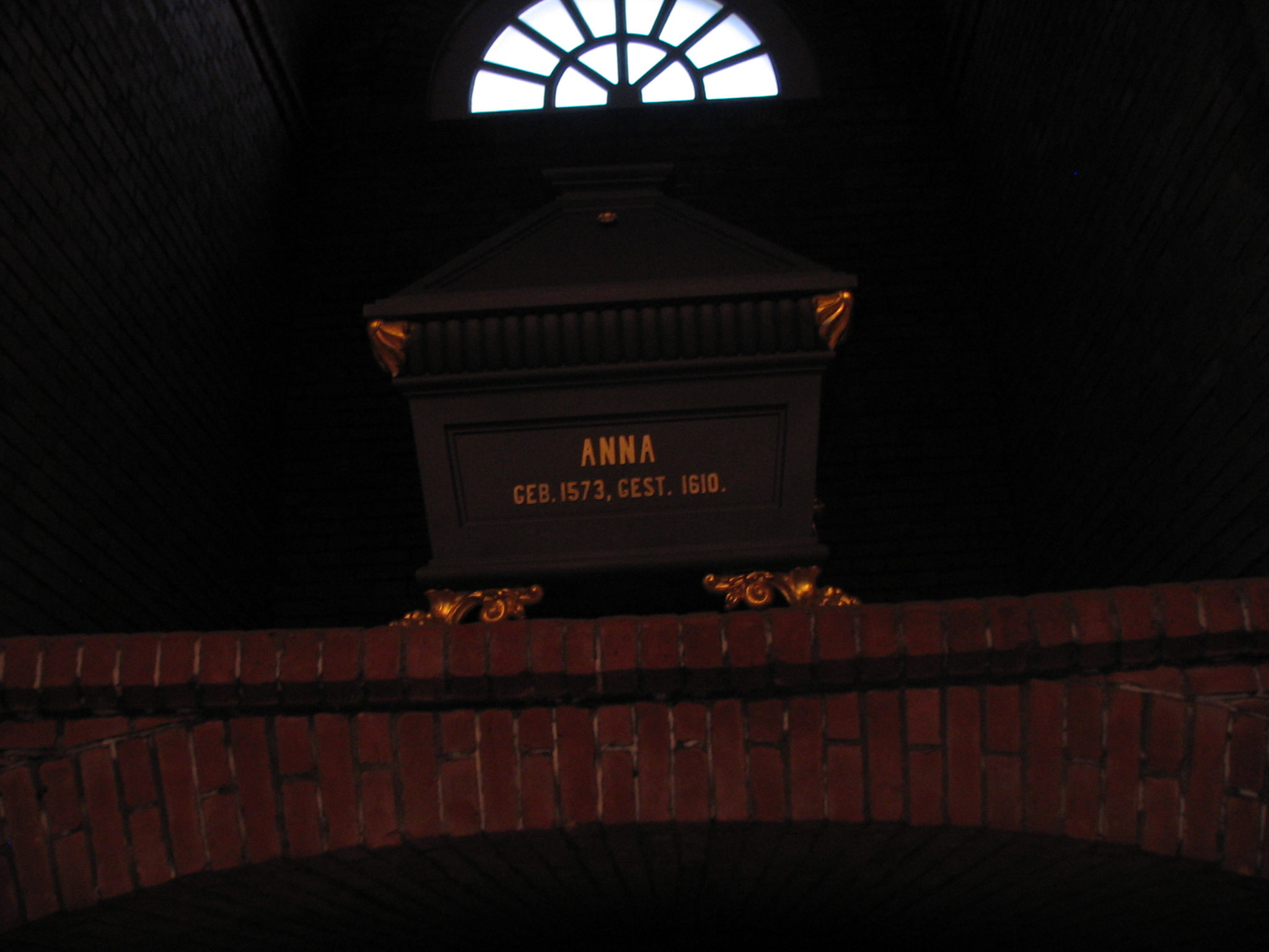 Anna 1573-1610